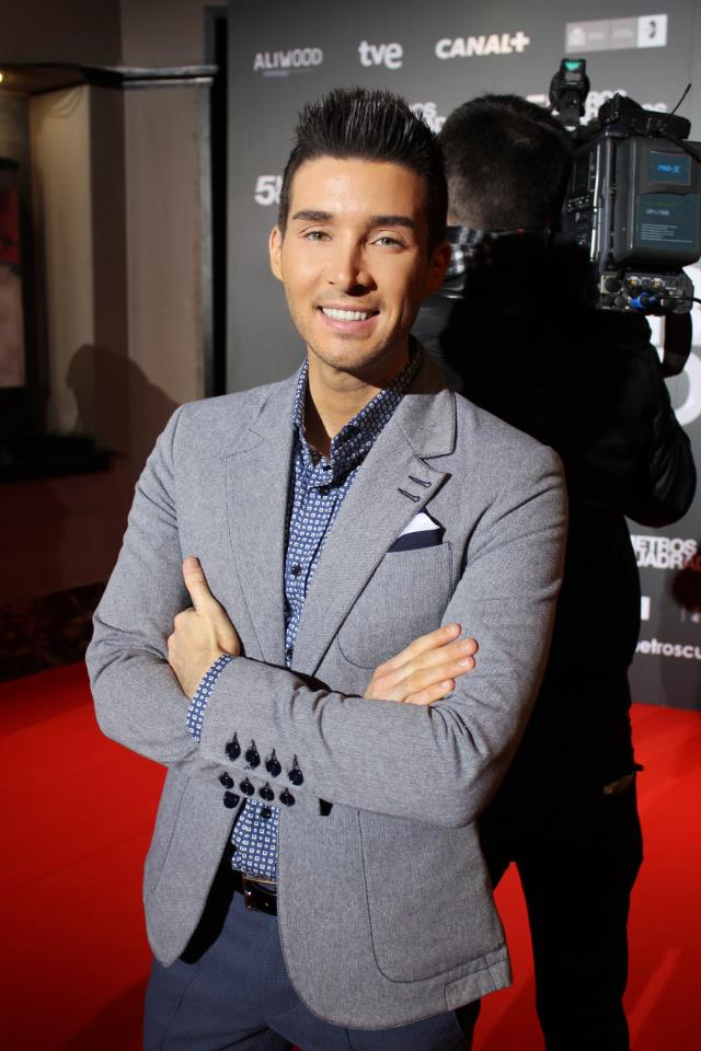 Jesús Guerrero, presentador de TVE.